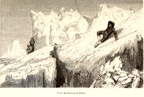 Arthur Mangin, Voyages et Découvertes outre-mer au XIXe siècle, illustrations par Durand-Brager, 1863 ː Mort du lieutenant Bellot.